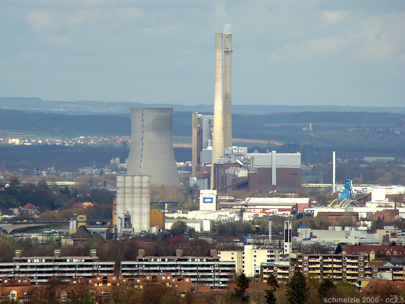 Kraftwerk in Heilbronn, vom Haigern bei Talheim aus gesehen